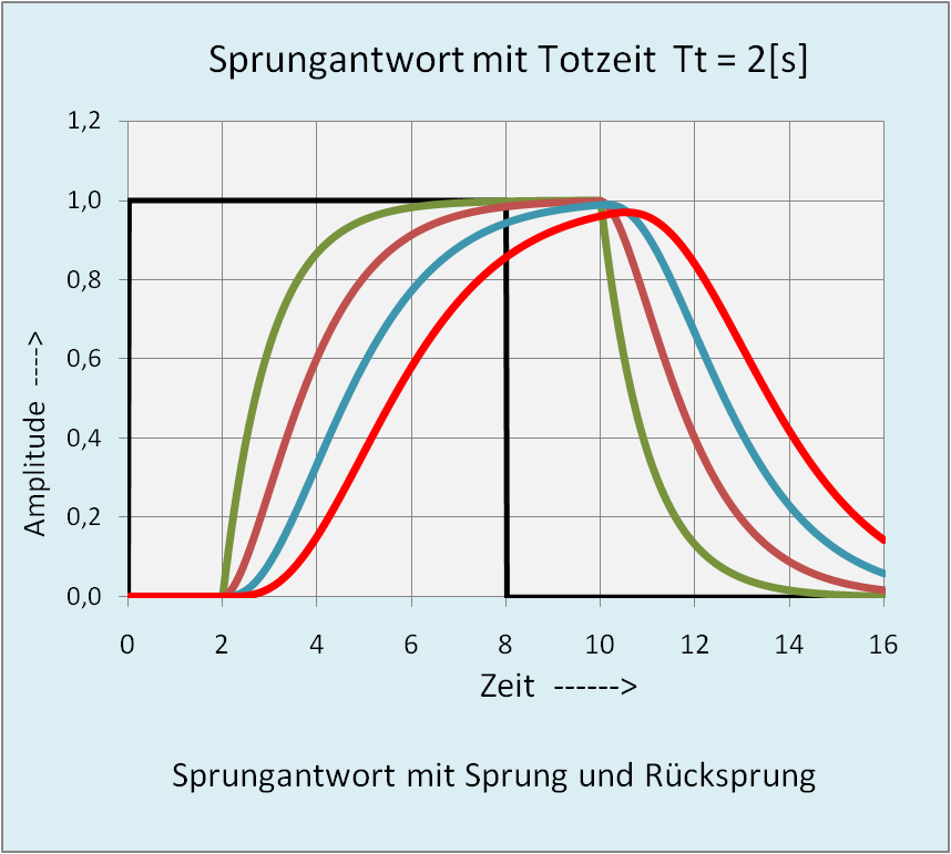 Sprungantwort eines Systems mit Totzeit und mehreren T1-Gliedern